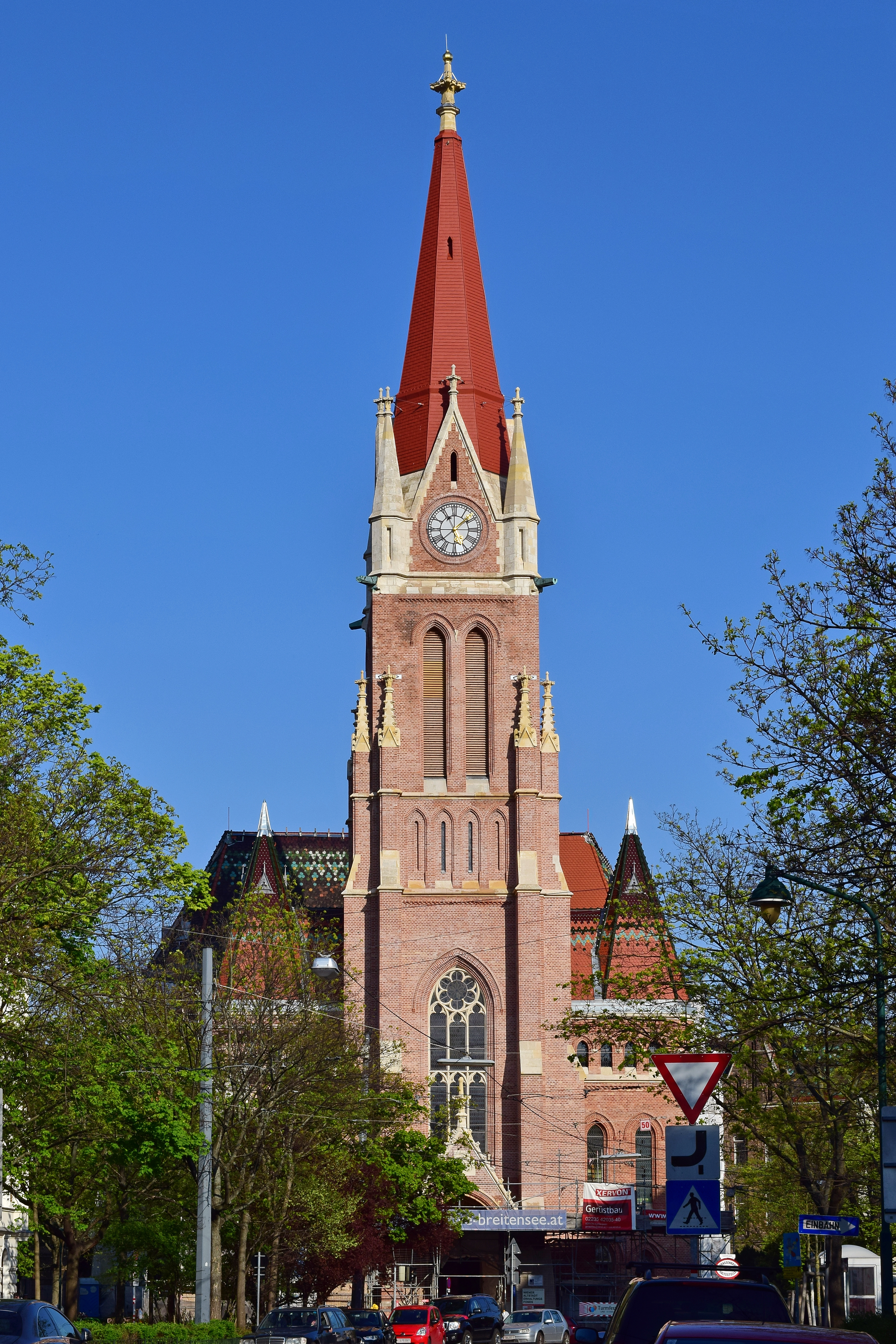 Die Breitenseer Pfarrkirche im April 2017 mit restauriertem Turm und ohne Gerüst. Bis die Kirche auch im hinteren Außenbereich fertig ist, wird es aber noch ein paar Jahre dauern.